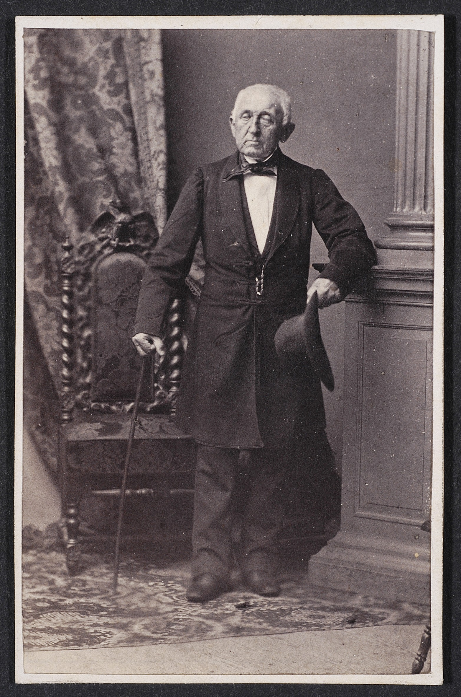 Marcin Tarnowski, [ante 1862 r.]